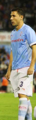 Roberto Lago xogador do Celta de Vigo no partido Celta-Dépor do 27 de outubro do 2012.